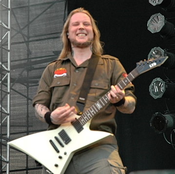 Jesper Strömblad an der Gitarre bei einem Open-Air-Konzert.